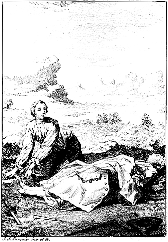 Illustration of Abbé Prévost's Histoire du Chevalier Des Grieux et de Manon Lescaut